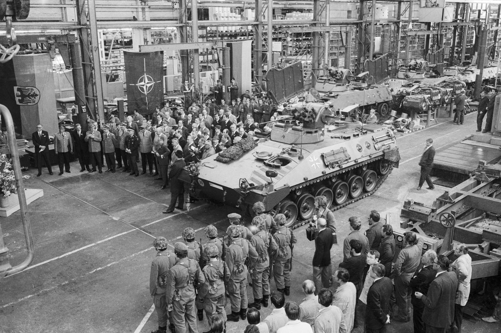 Maschinenbau Kiel AG (MaK) übergibt ersten Schützenpanzer Marder an die Bundeswehr